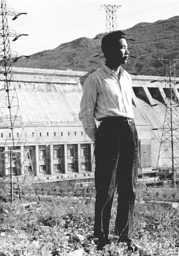 1959年，李鹏在丰满发电厂留影。